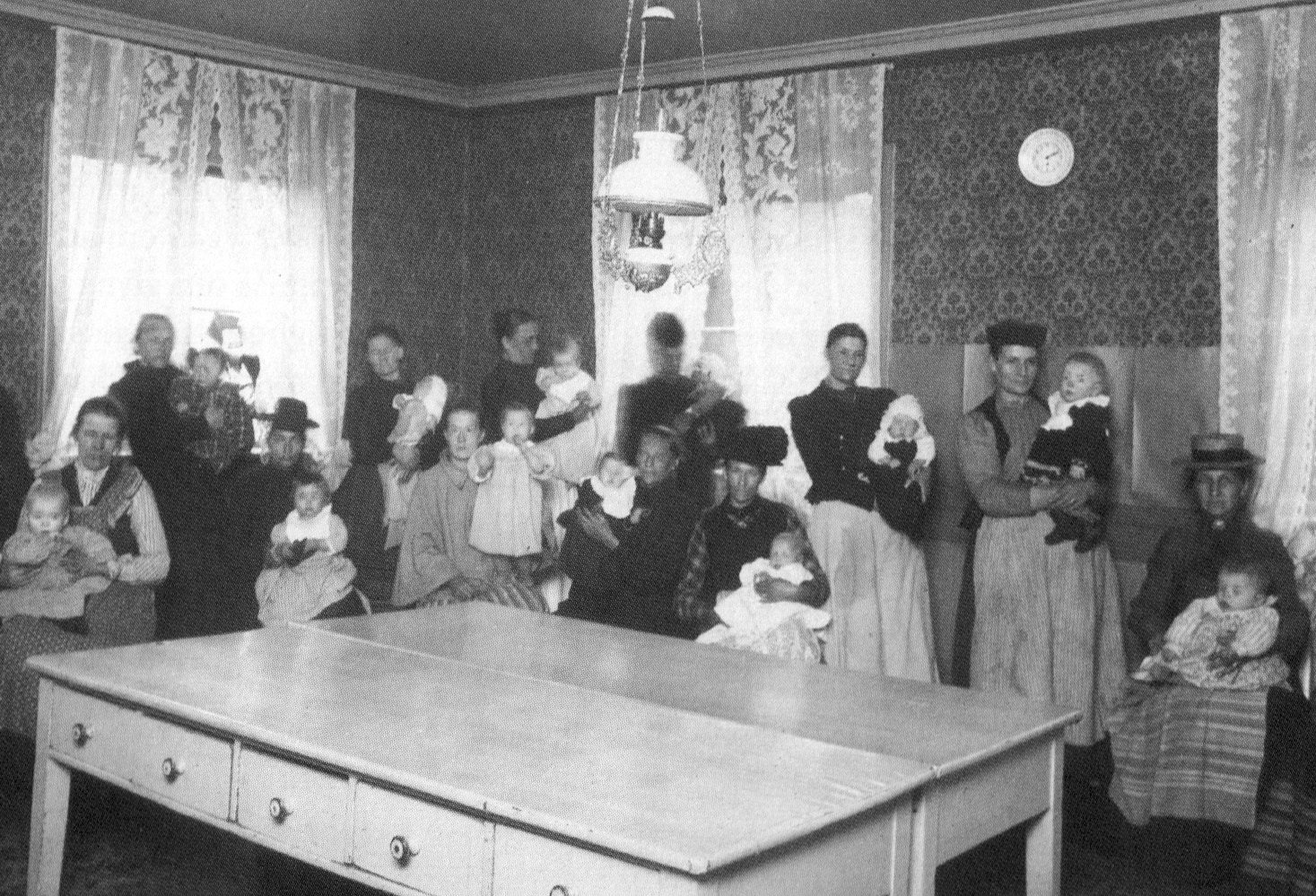 Mjölkdroppens klinik, Bryggaregatan 17, Stockholm